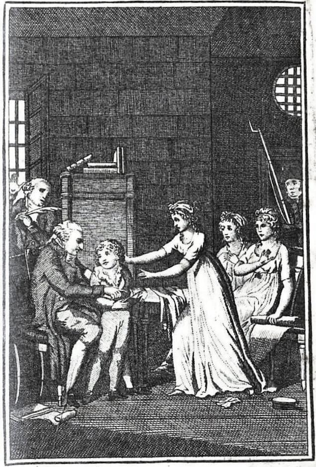 "Denis détrôné enseignait à lire. L'enseignait-il à ses enfants ?".